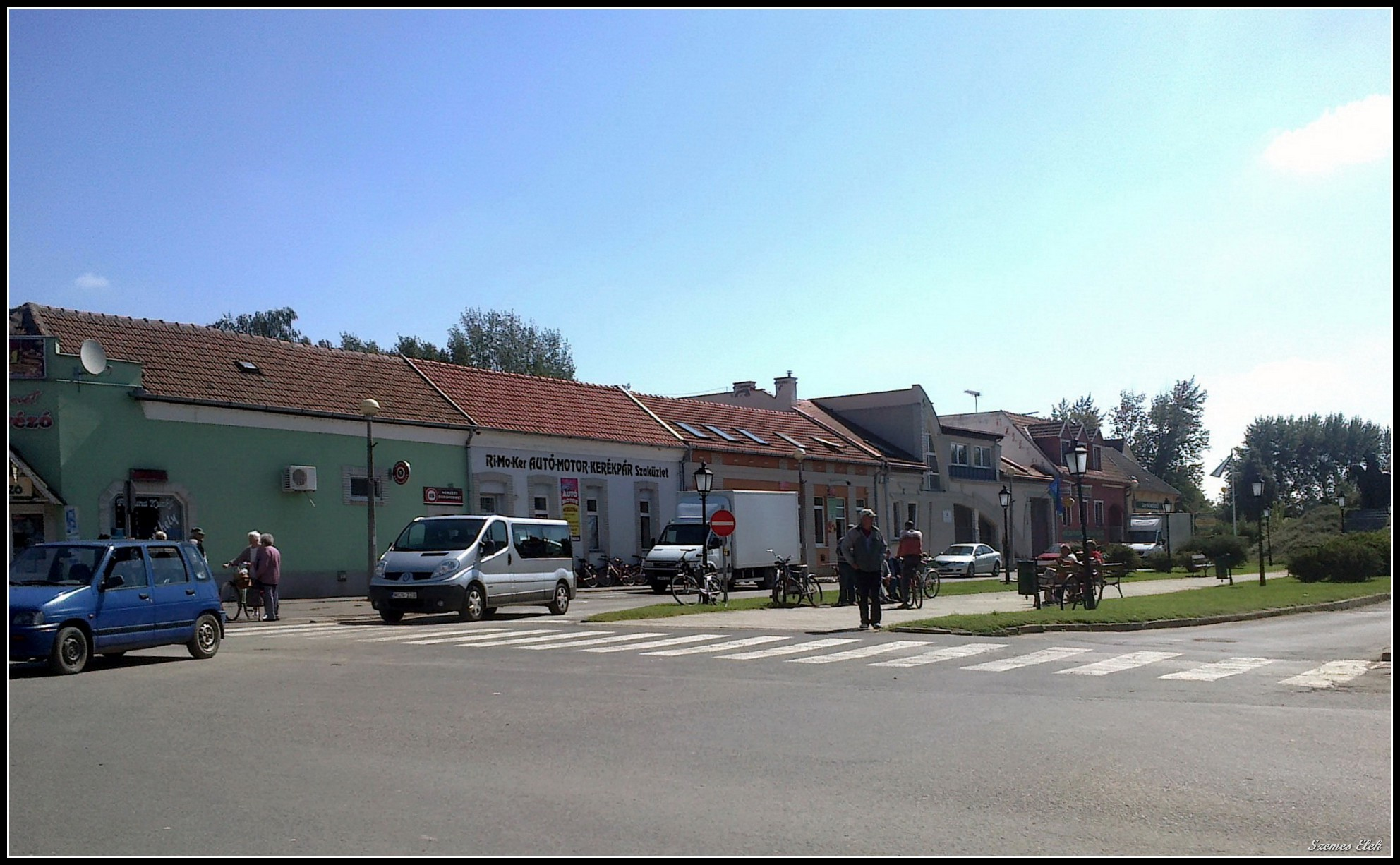 Csenger, 4765 Hungary